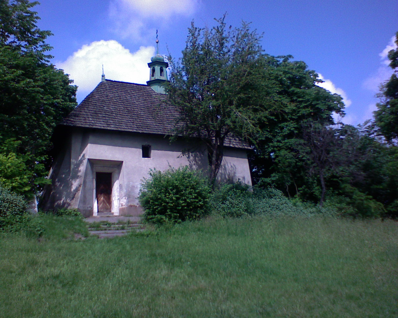 Kościół Św. Benedykta w Krakowie.